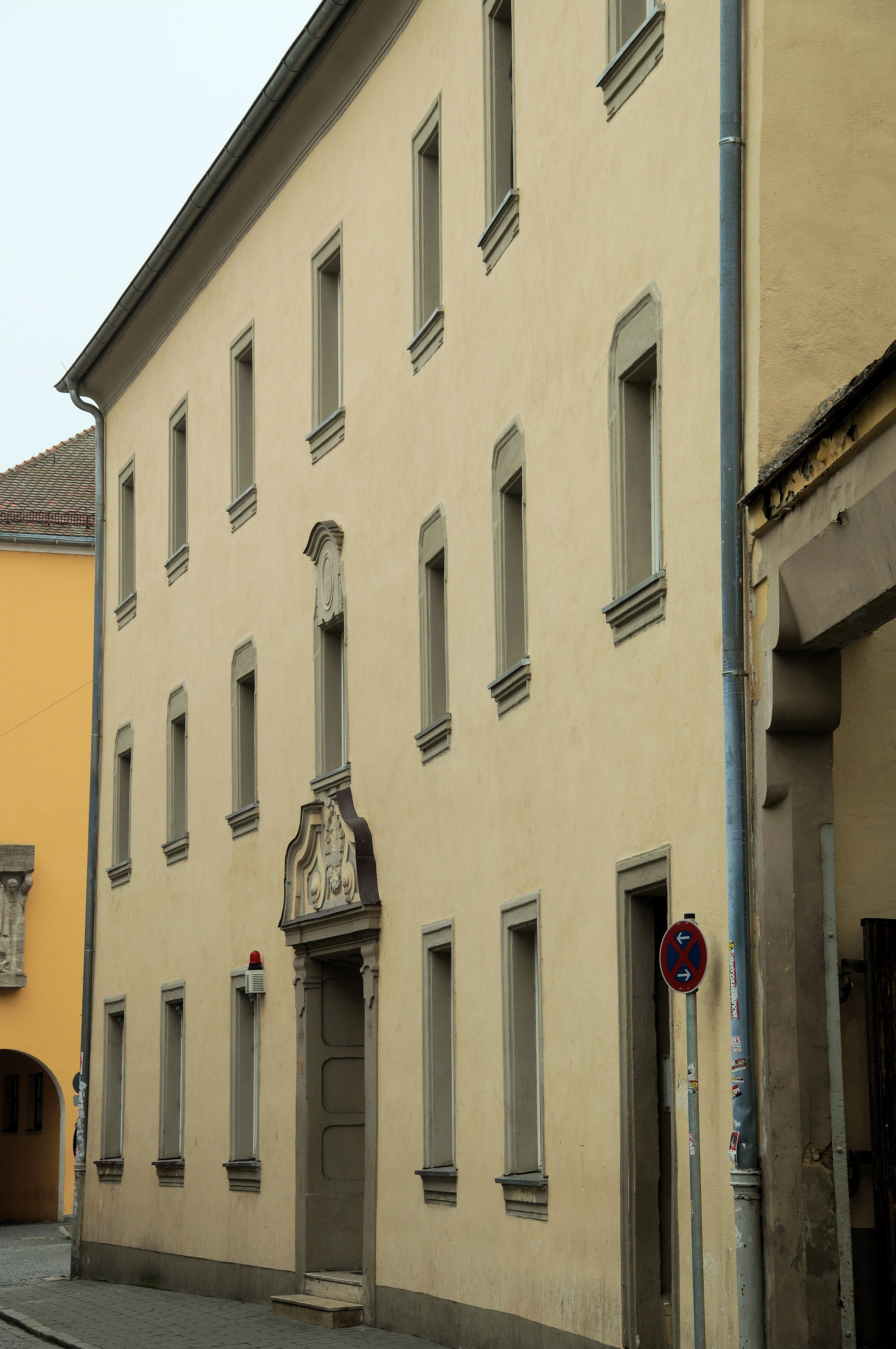 Ehem. Wirtschaftsgebäude des Jesuitenkollegs St. Paul und Jesuitenbrauerei, zweiflügeliger Baukomplex; nördliches Haupthaus, ehem. Brauereigaststätte, dreigeschossiger Walmdachbau, mit Werksteingliederungen, 18./19. Jahrhundert, Fassade historistisch, bez. 1910, Gedenktafel für Nicasius Grammatici, 19. Jh.; Westflügel, drei- und viergeschossiger langgestreckter Walmdachbau, im Kern spätes 16./frühes 17. Jahrhundert, Umbauten im 19./20. Jahrhundert; Toreinfahrt zum ehem. Jesuitengässel, reduzierter Jugendstil, 1907 erweitert. This is a photograph of an architectural monument.